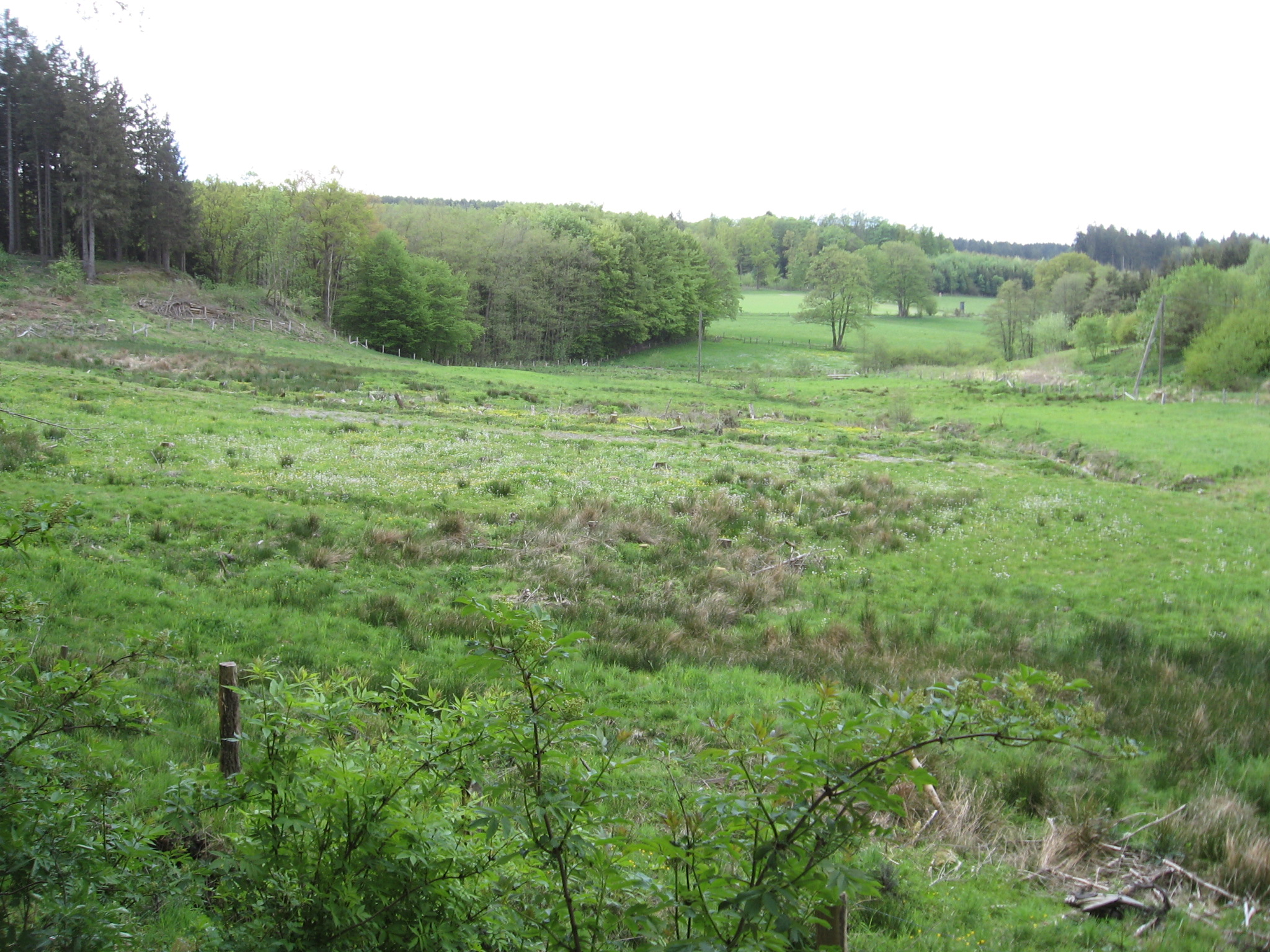 Naturschutzgebiet Talsystem der Glenne auf Höhe der Altenbürener Mühle nach Süden aufgenommen.